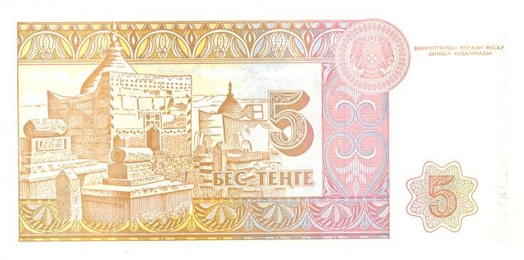 5 тенге 1993 года